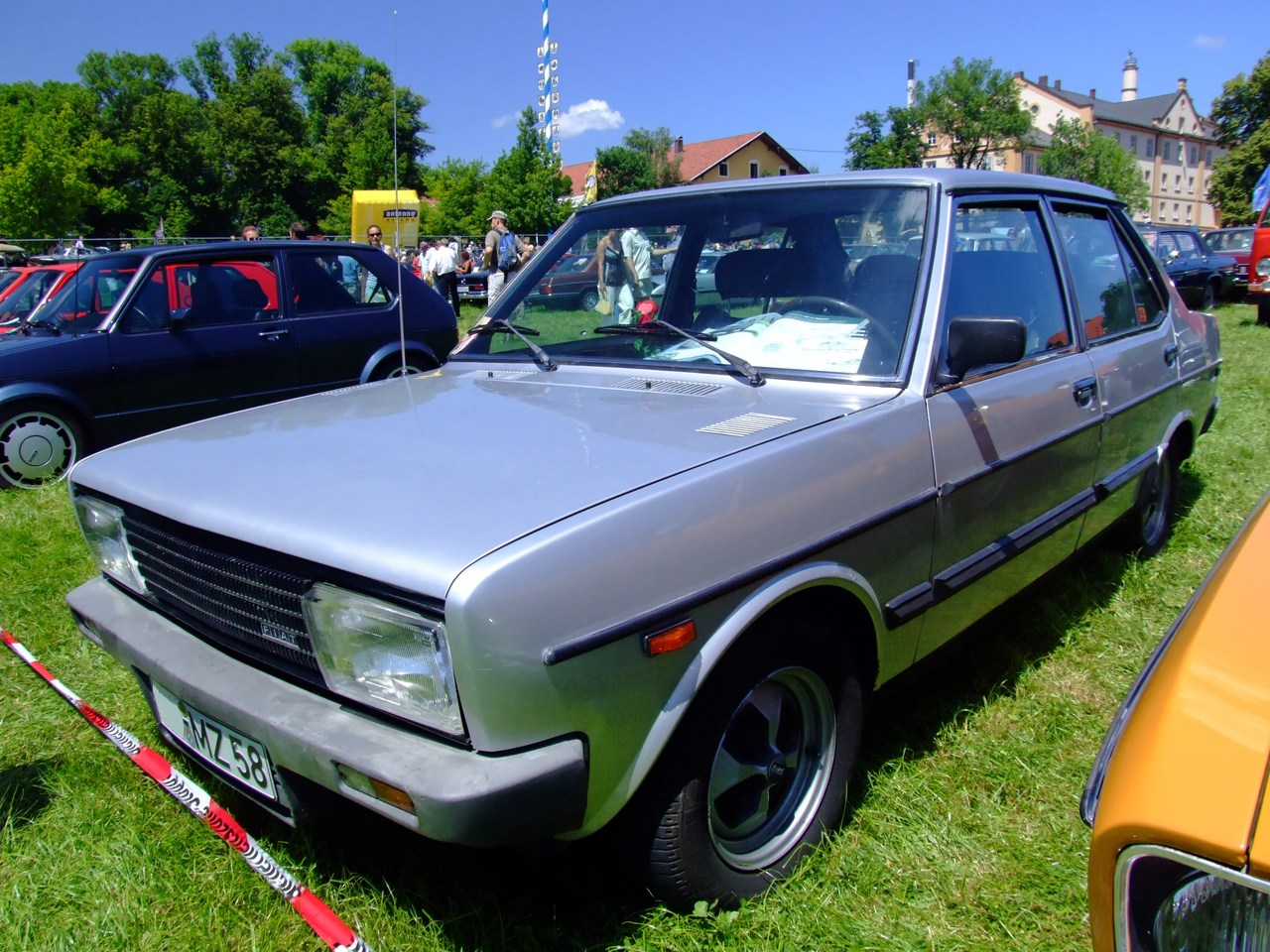 Quelle: selbst fotografiert, 06/2007 Fotograf: Späth Chr.